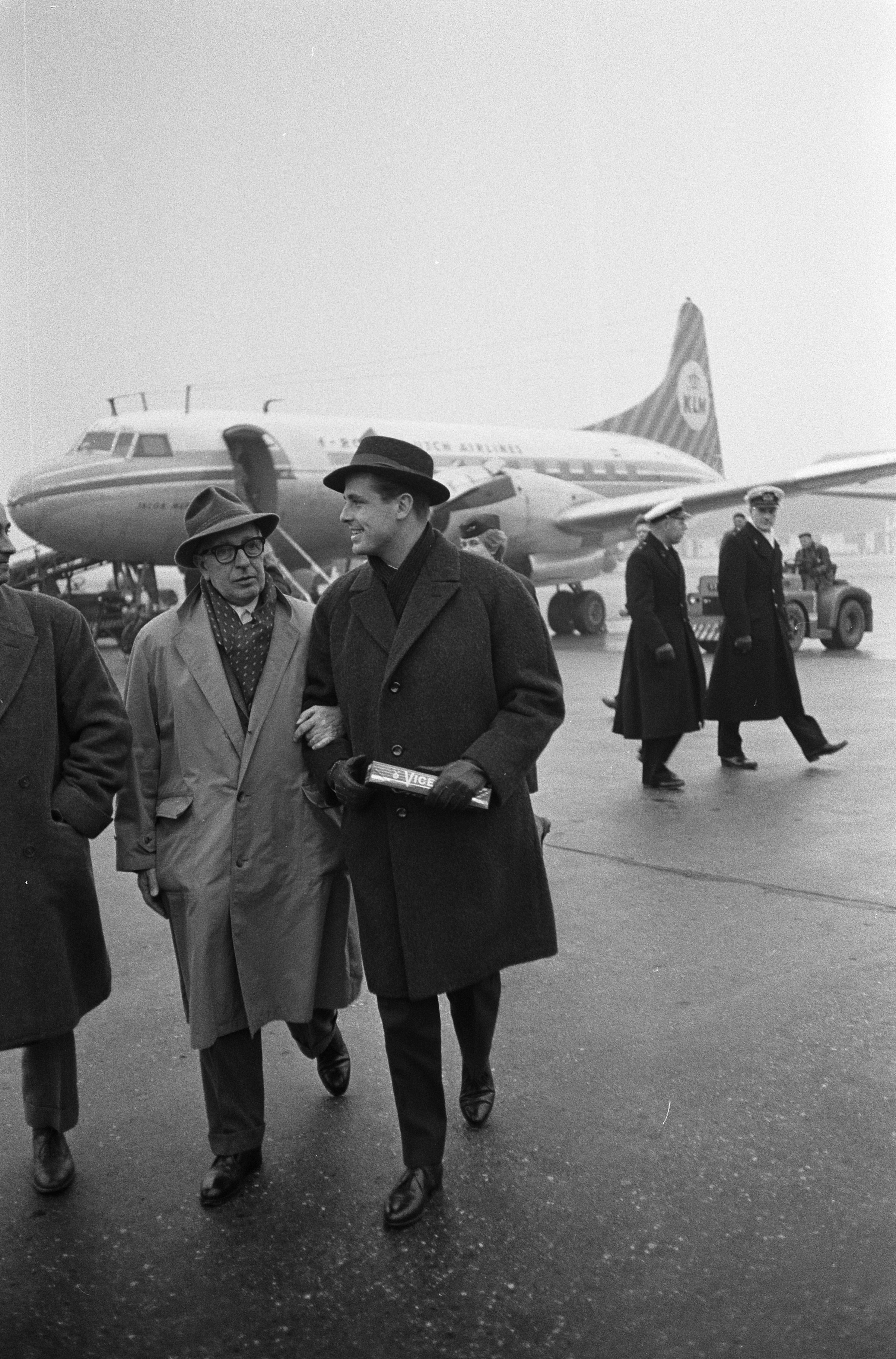 Collectie / Archief : Fotocollectie Anefo Reportage / Serie : Aankomst Duitse filmacteur Joachim Hansen op Schiphol Joachim Hansen tijdens persconferentie Beschrijving : Aankomst van de Duitse filmacteur Joachim Hansen op Schiphol Datum : 16 december 1960 Locatie : Amsterdam, Noord-Holland, Schiphol Trefwoorden : aankomst en vertrek, acteurs, film Persoonsnaam : Hansen, Joachim Fotograaf : Fotograaf Onbekend / Anefo, [onbekend] Auteursrechthebbende : Nationaal Archief Materiaalsoort : Negatief (zwart/wit) Nummer archiefinventaris : bekijk toegang 2.24.01.05 Bestanddeelnummer : 911-8809